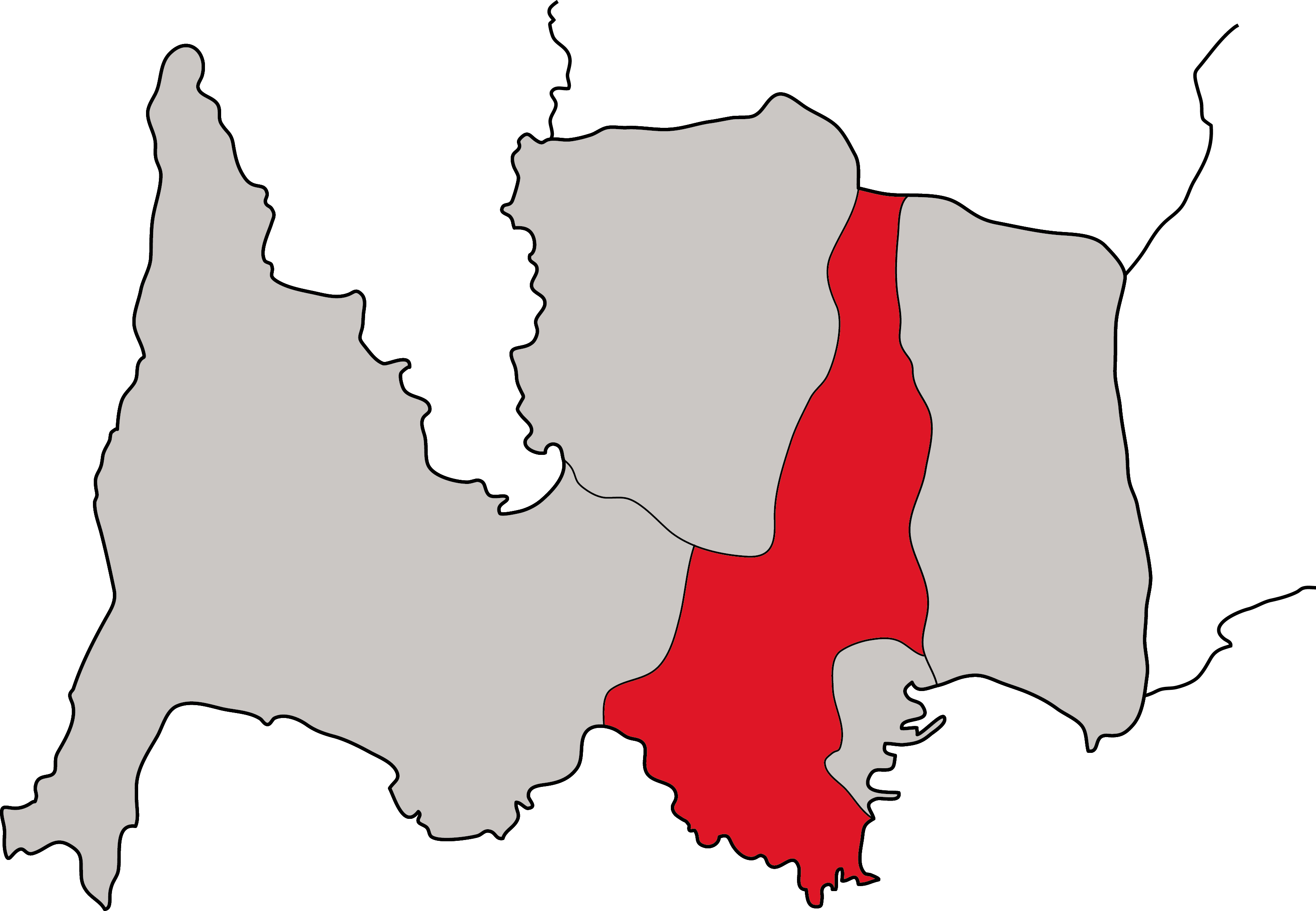 Localizacion da parroquia de Darbo no concello de Cangas.